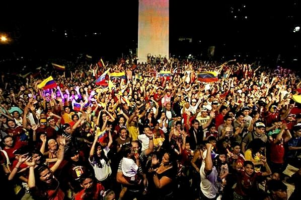 Fanaticos de venezuela viendo un partido de la seleccion de venezuela en la copa america 2011 en maracaibo, estado zulia